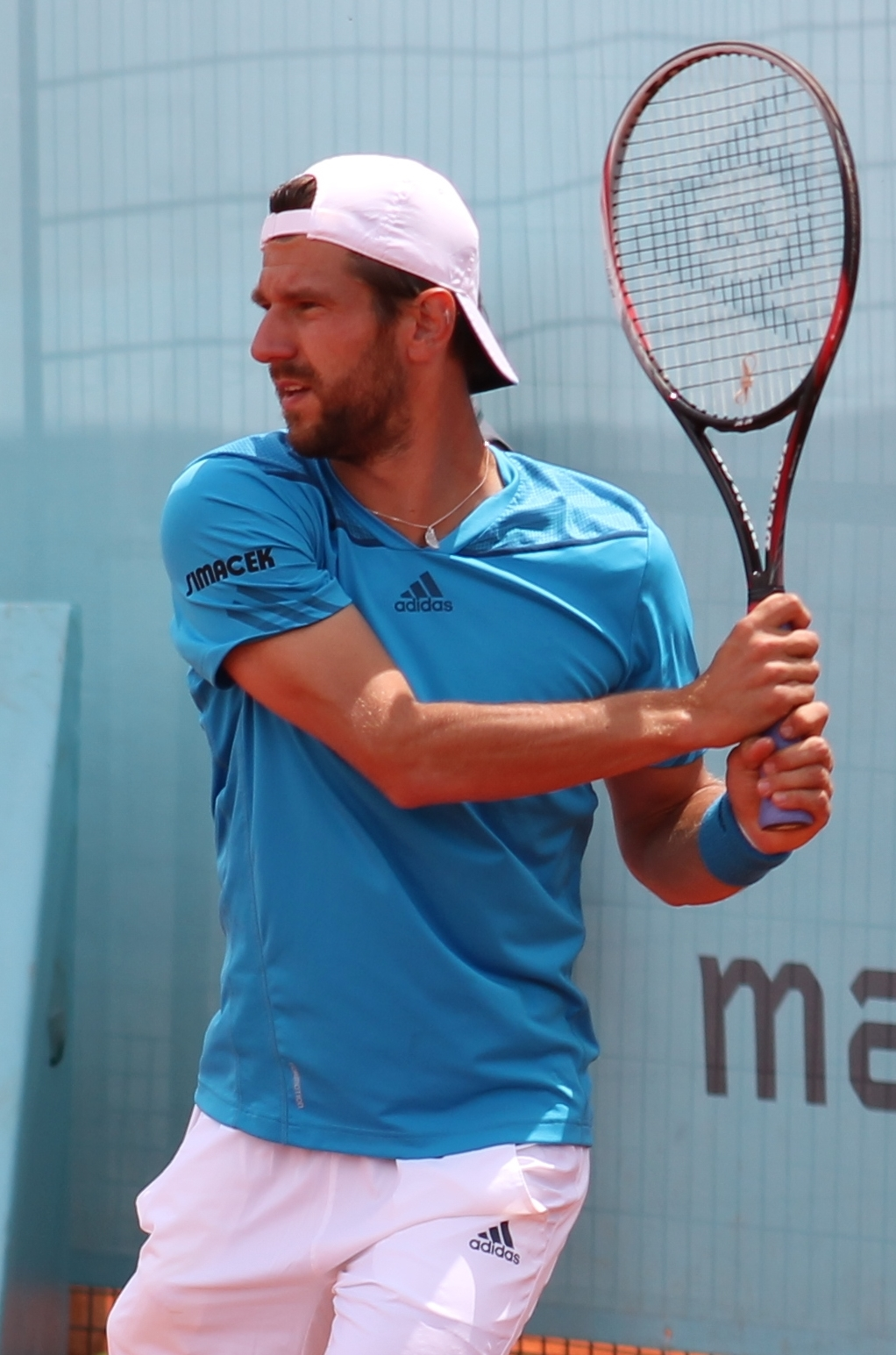 Melzer MA14 (6) - Copy